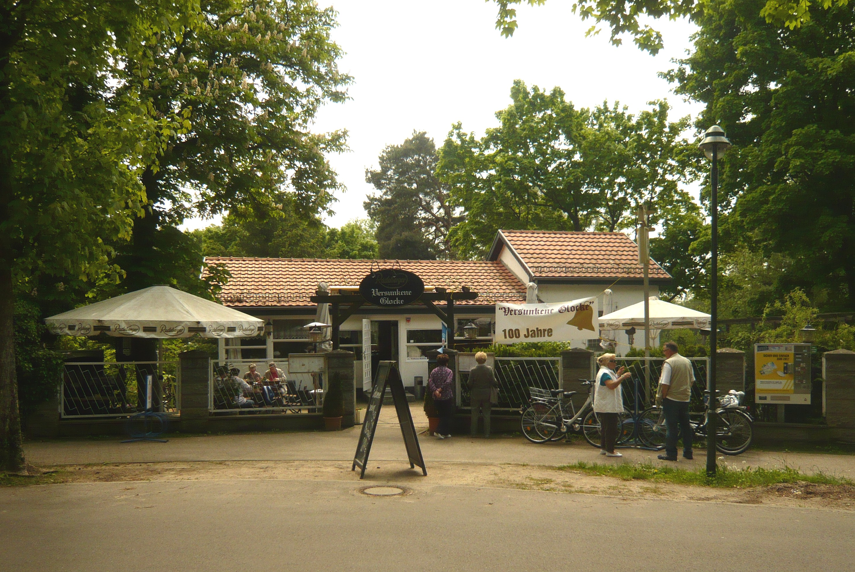 Gemeinde Wandlitz, Ortsteil Wandlitzsee: Gasthaus Versunkene Glocke